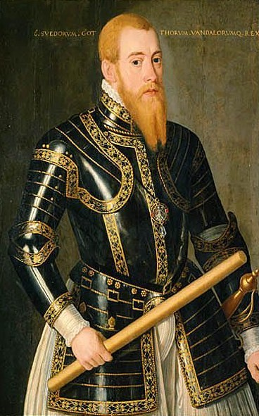 Erik XIV